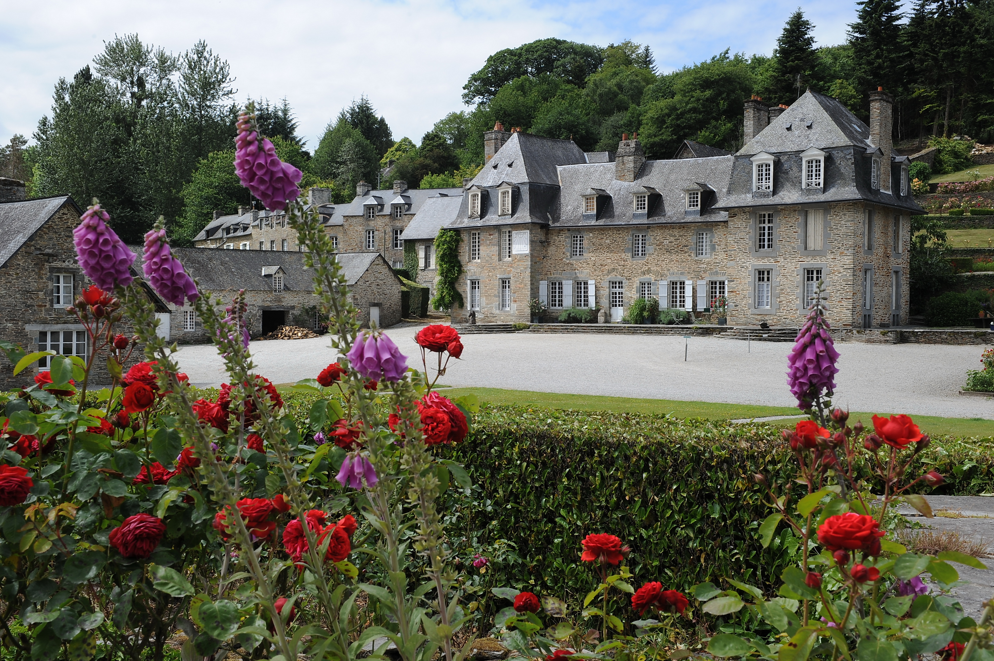 Le logis du directeur des forges des Salles